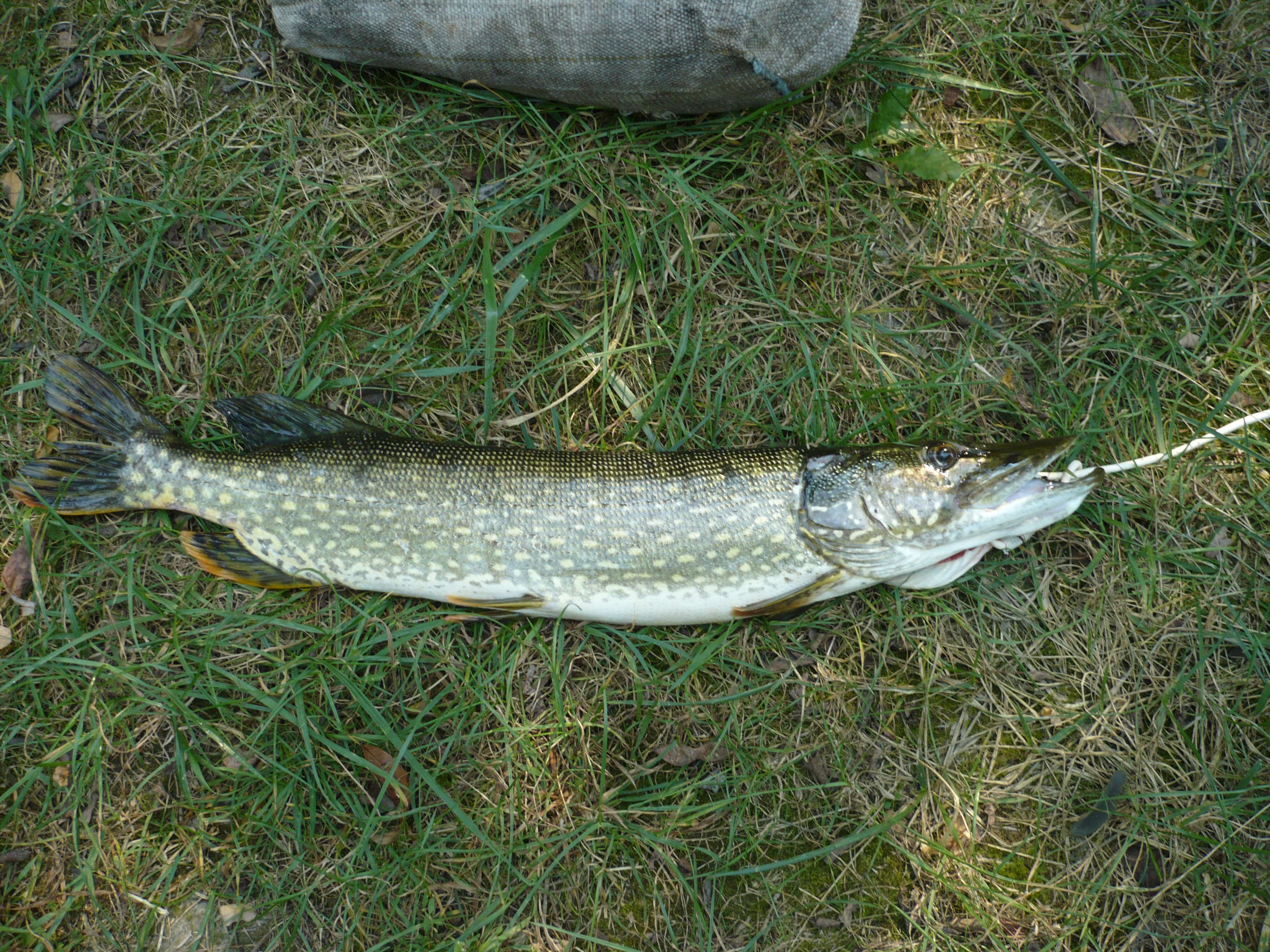 Termetes csuka a horgászok zsákmánya (Bezdán, Szerbia)